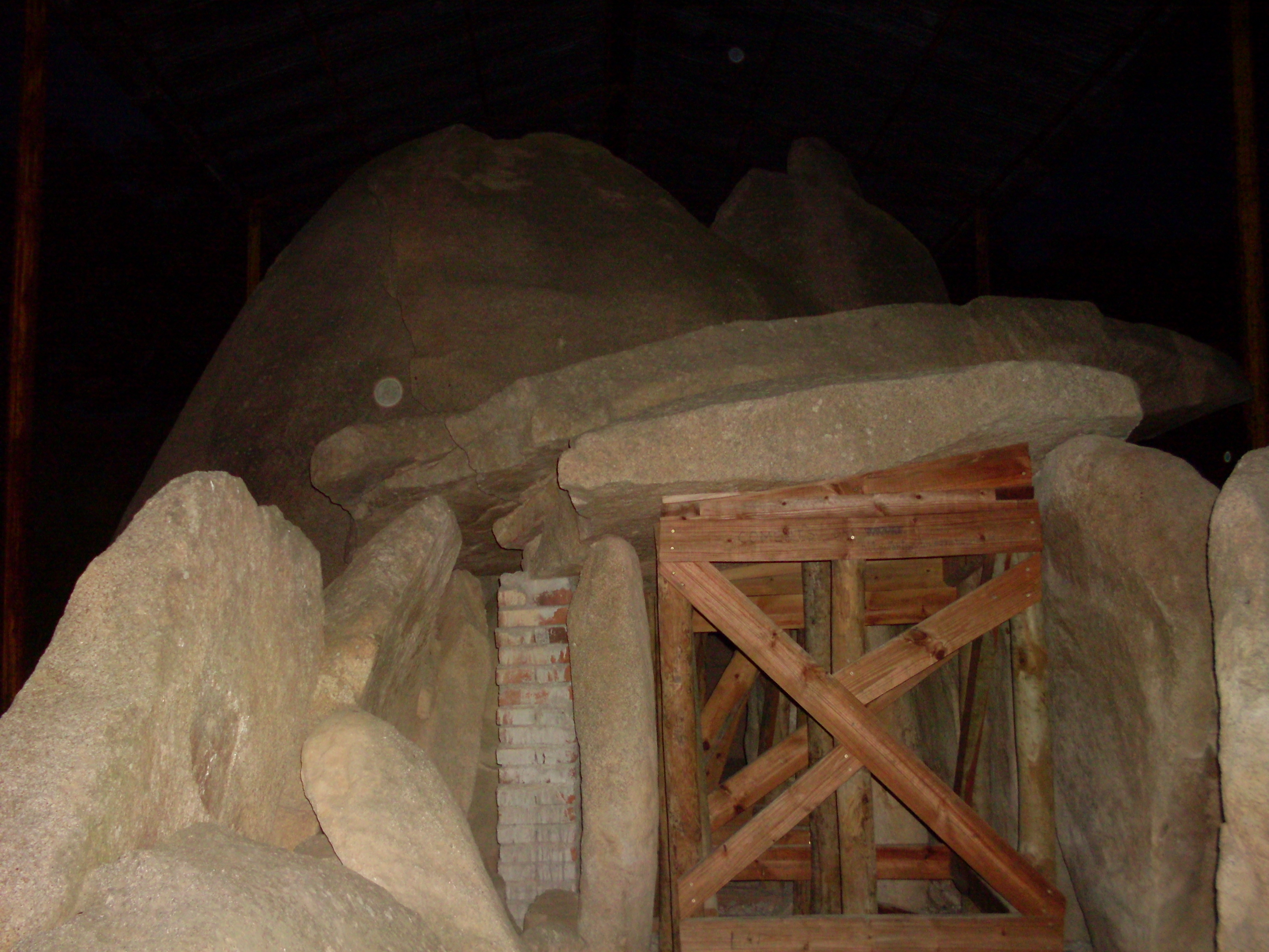 Anta Grande do Zambujeiro